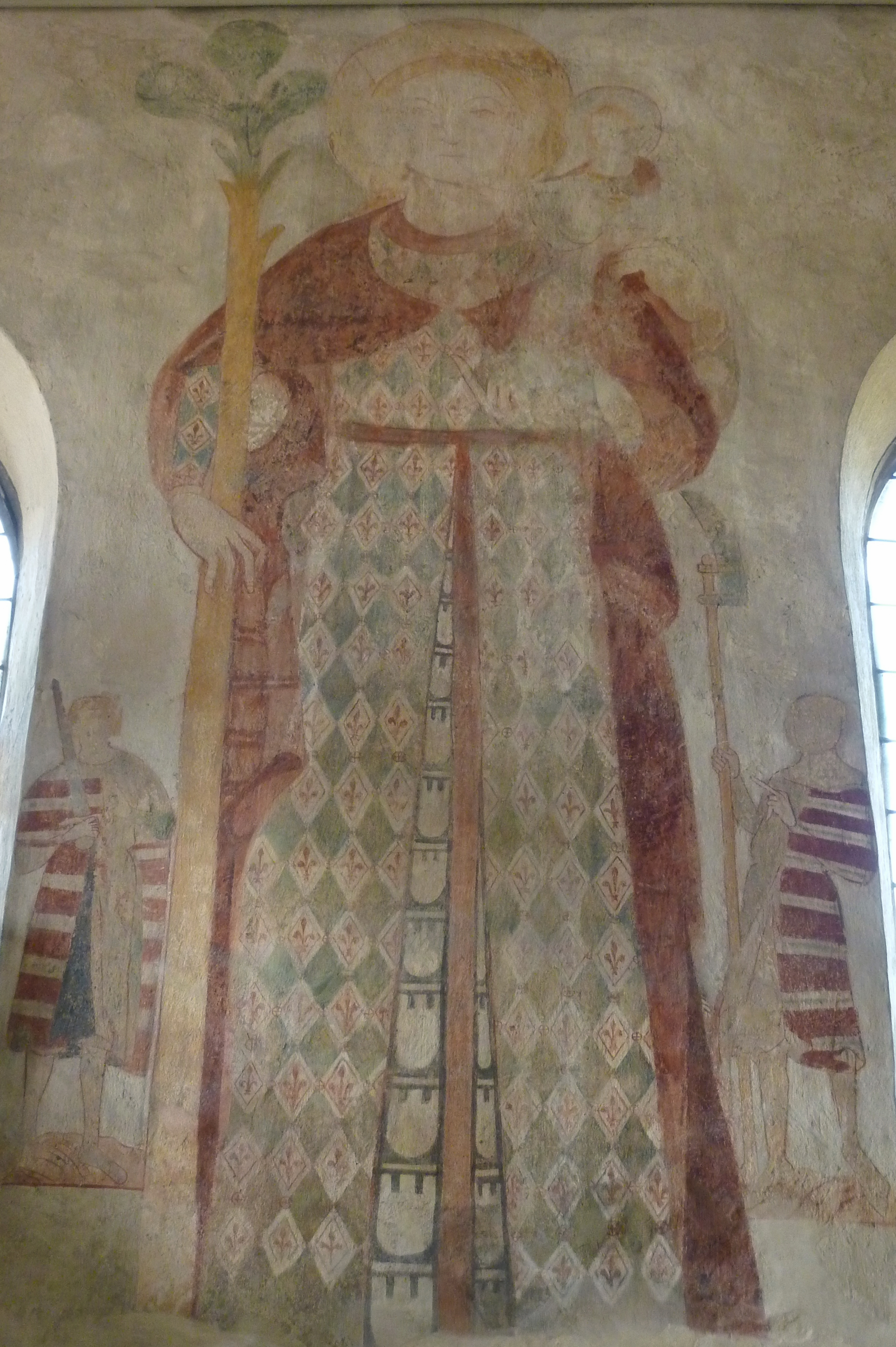 Gotische Wandmalerei in der Peterskapelle in Spay, Darstellung: hl. Christophorus